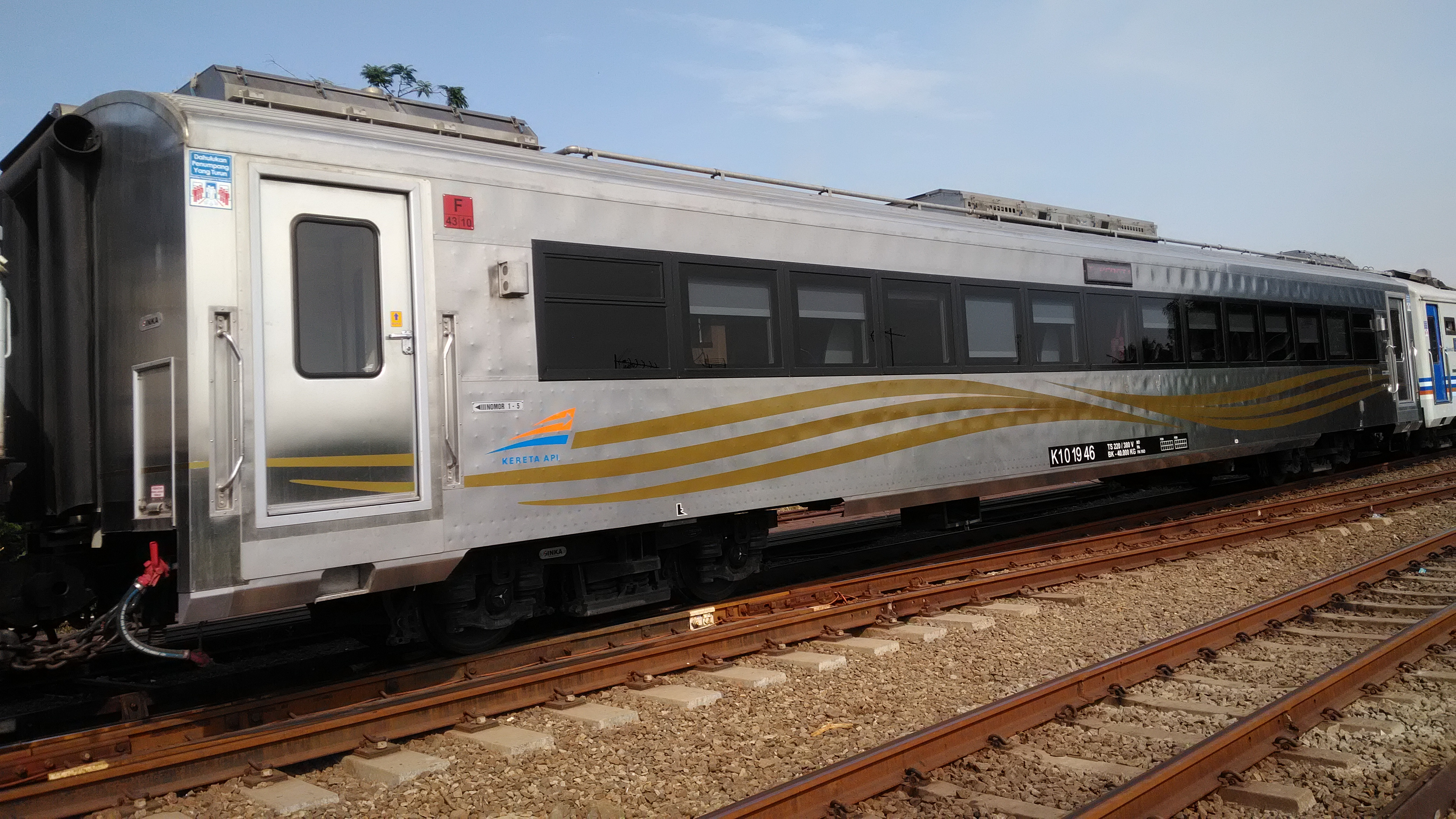 Rangkaian Luxury Generasi Kedua Sunda: Rangkéan Luxury Generasi nu kadua